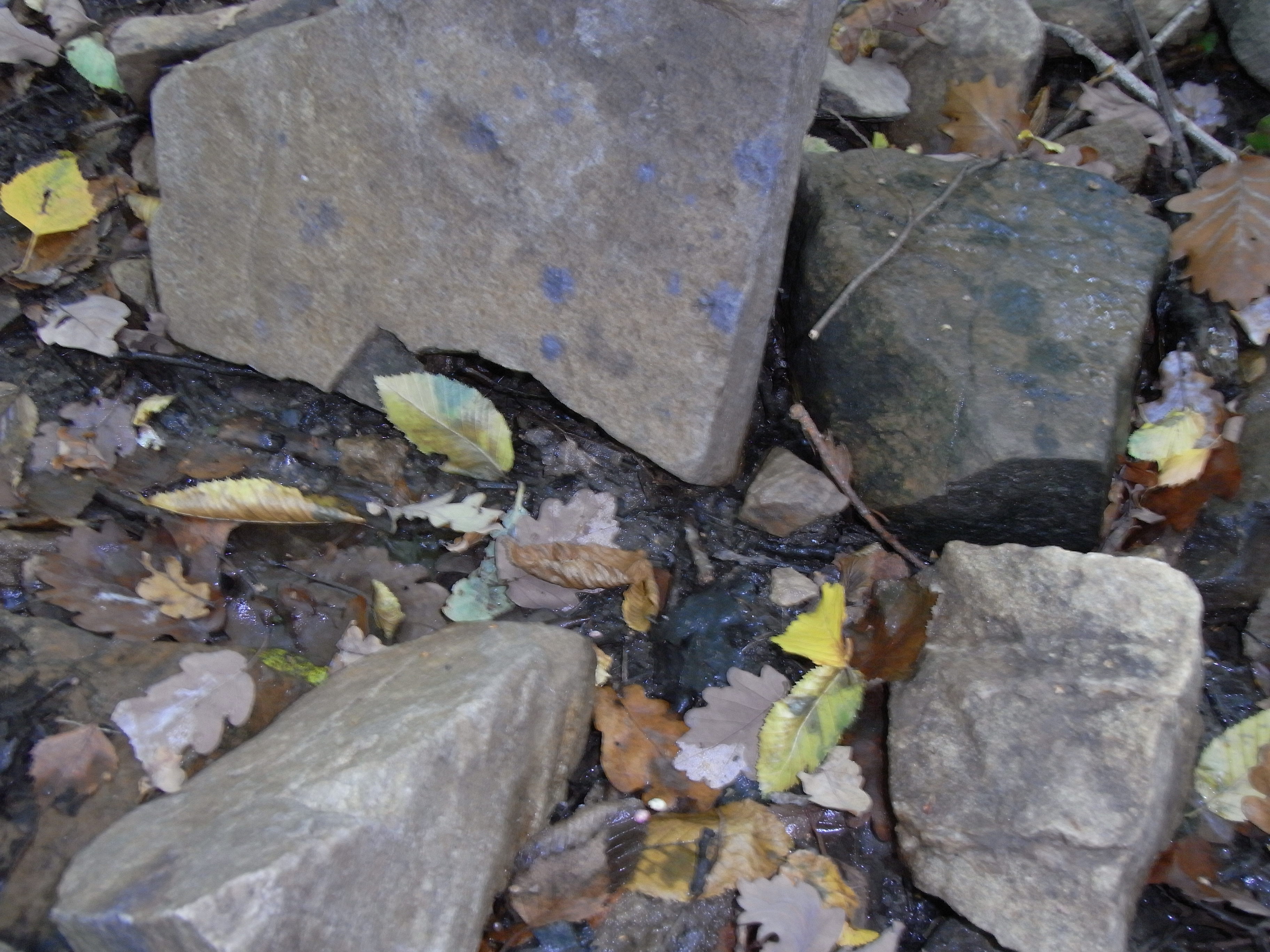 Im Hauptlauf des Aitzenbachs von der unteren Quelle gleich unterhalb der Panzerstraße finden sich dunkel verfärbte Sandsteinbrocken